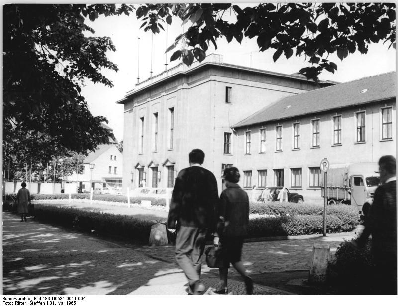 Magdeburg, Klubhaus "Ernst Thälmann" Zentralbild Ritter Kri-rr 31.5.1965 Vorbereitung VII. Arbeiterjugendkongress Magdeburg. Vom 5.6. bis 7.6. findet in Magdeburg der VII. Deutsche Arbeiterjugendkongress statt. Die Stadt wird in diesen Tagen zum Treffpunkt Tausender Jugendlicher, die hier fröhliche Pfingsttage erleben werden. Die Gäste aus Westdeutschland werden aus eigener Anschauung erleben, wie iin der DDR das Mitbestimmungsrecht der Jugend verwirklicht wurde, wofür die westdeutsche Jugend heute noch erbittert kämpfen muß. UBz: Klubhaus "Ernst Thälmann", der Begegnungsort des Arbeiterjugendkongresses.